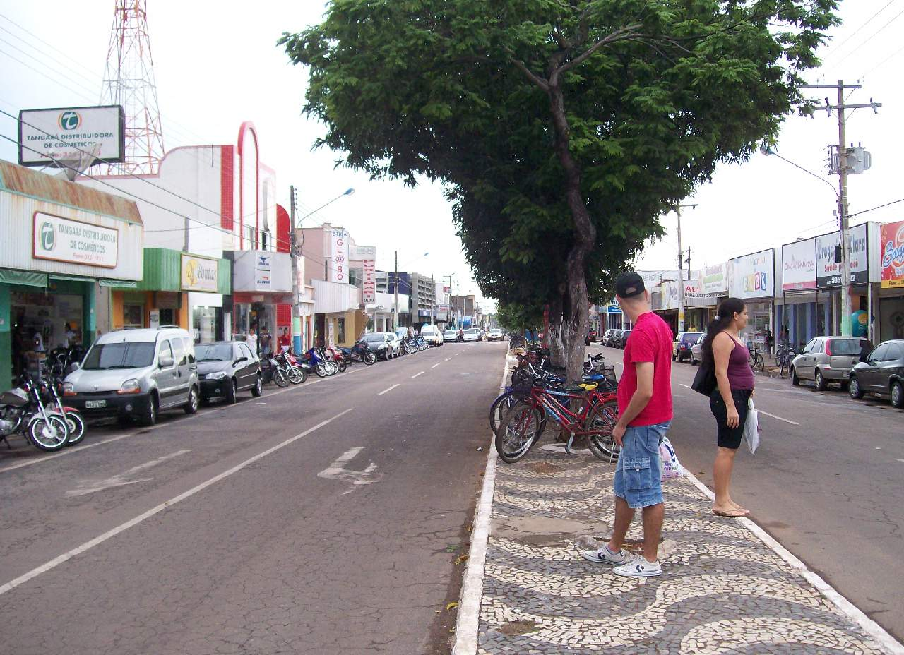 Centro comercial de Gurupi Tocantins, Brasil.